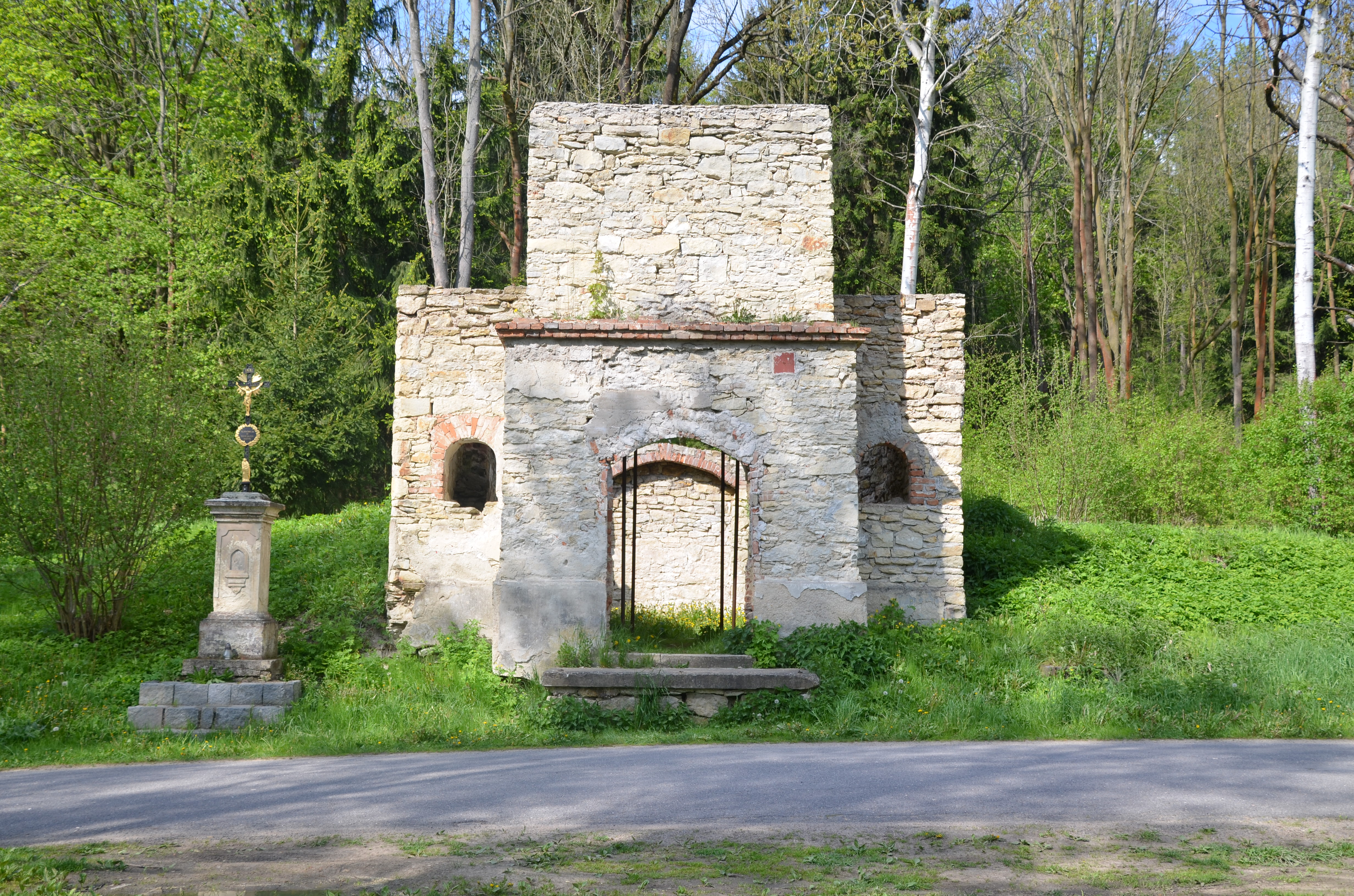 Kaple Svatého Františka Xaverského v zaniklé obci Muzlov u Březové nad Svitavou